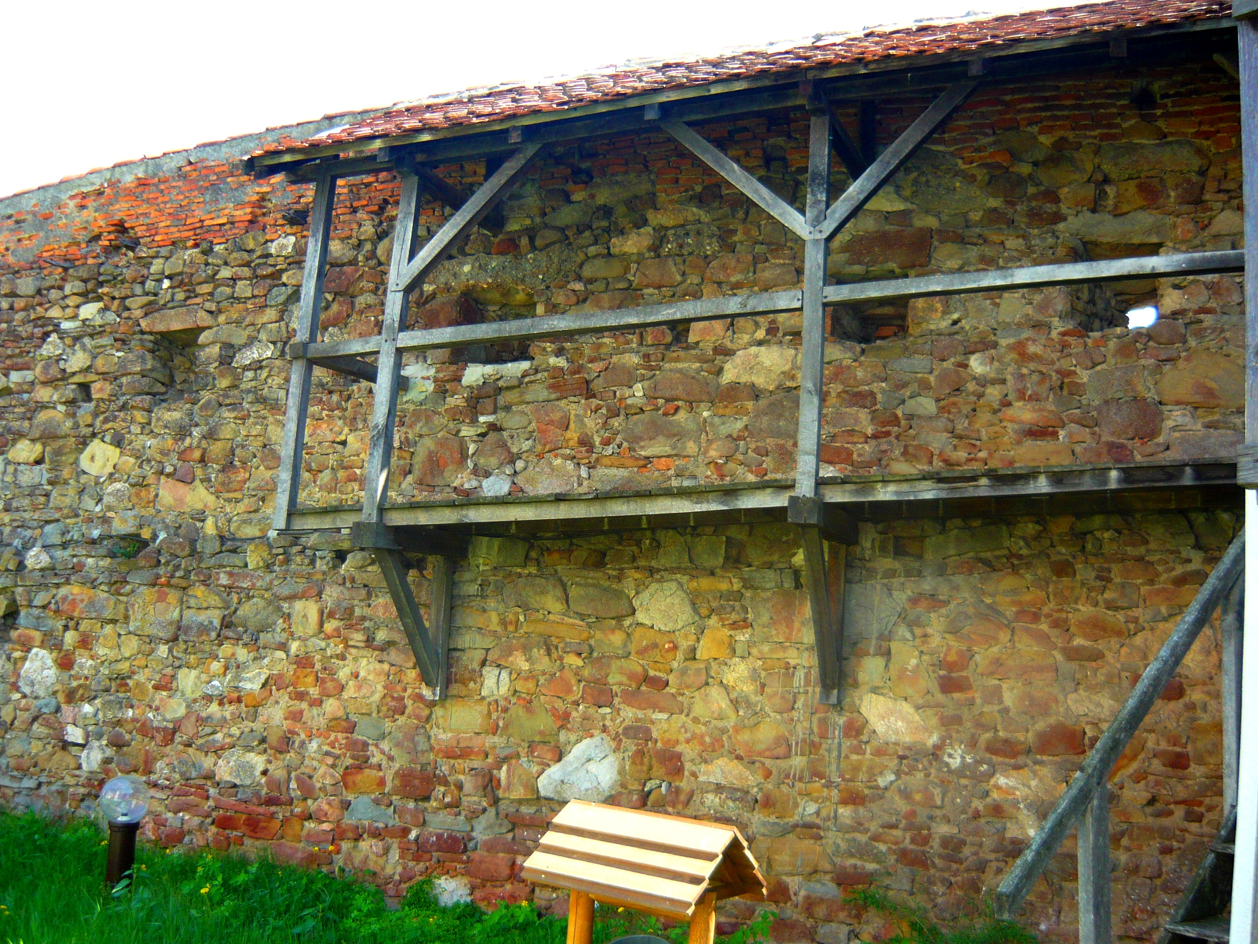 Incintă fortificată exterioară. Biserica fortificată, Reformată, din Ilieni, Jud. Covasna. Zid curtină exterioară. 03